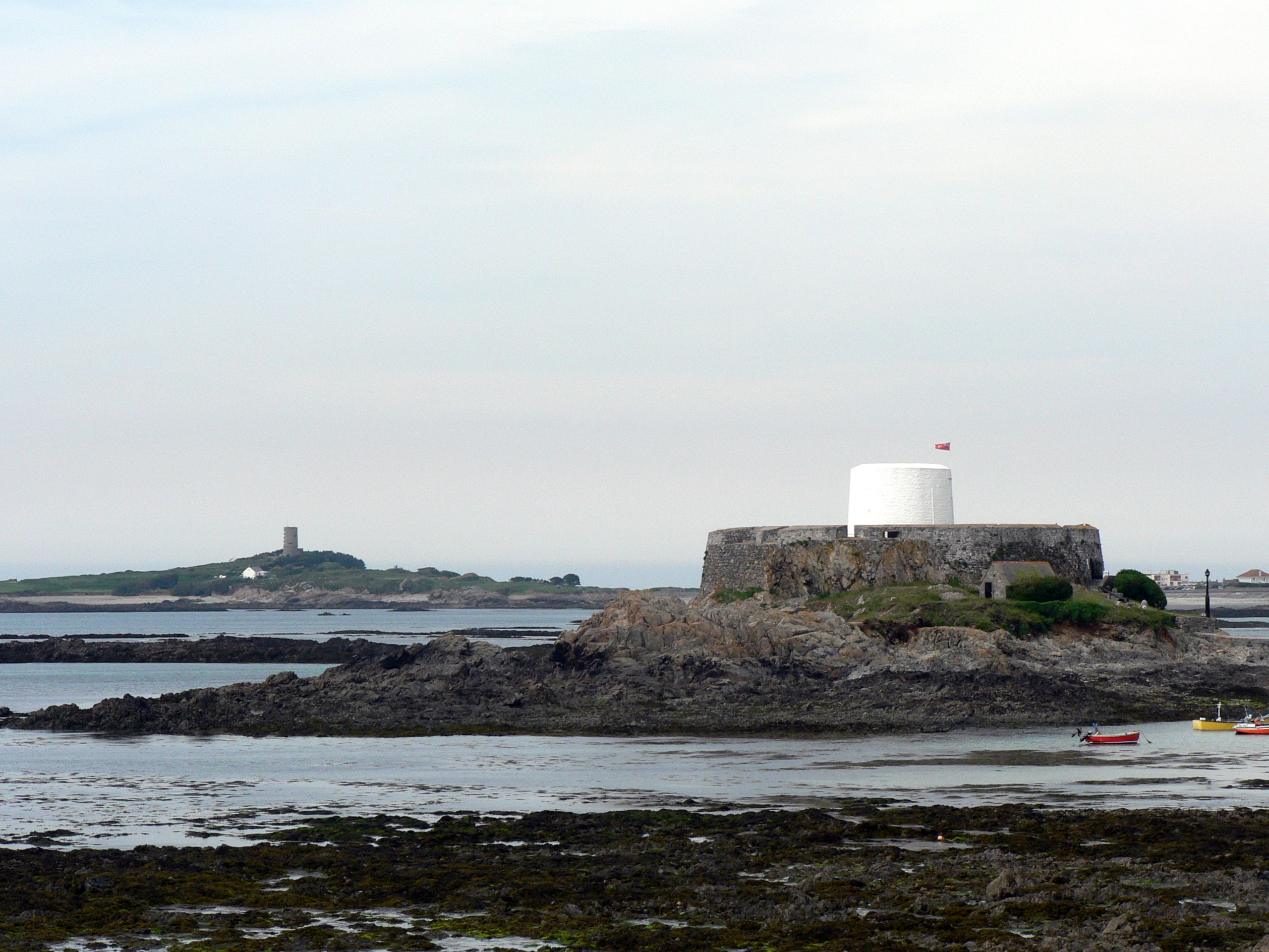 Fort Grey in Rocquaine Bay, Saint Pierre du Bois, Guernsey